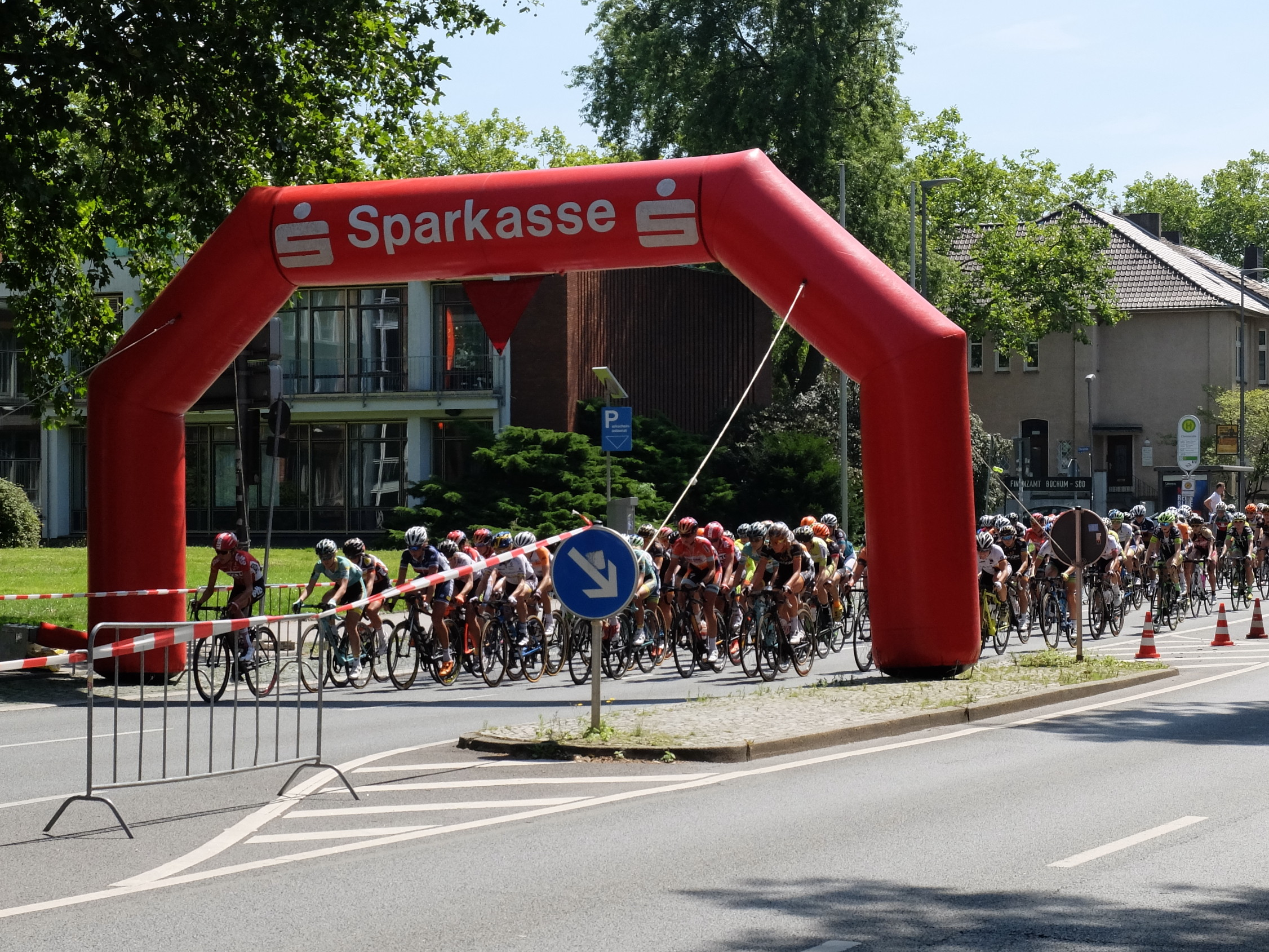 Sparkassengiro 2015 (Frauen) Königsallee höhe Finanzamt Bochum-Süd 1.000 m vor dem Ziel